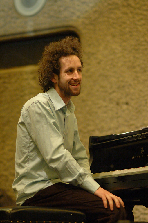 Nick Ramm